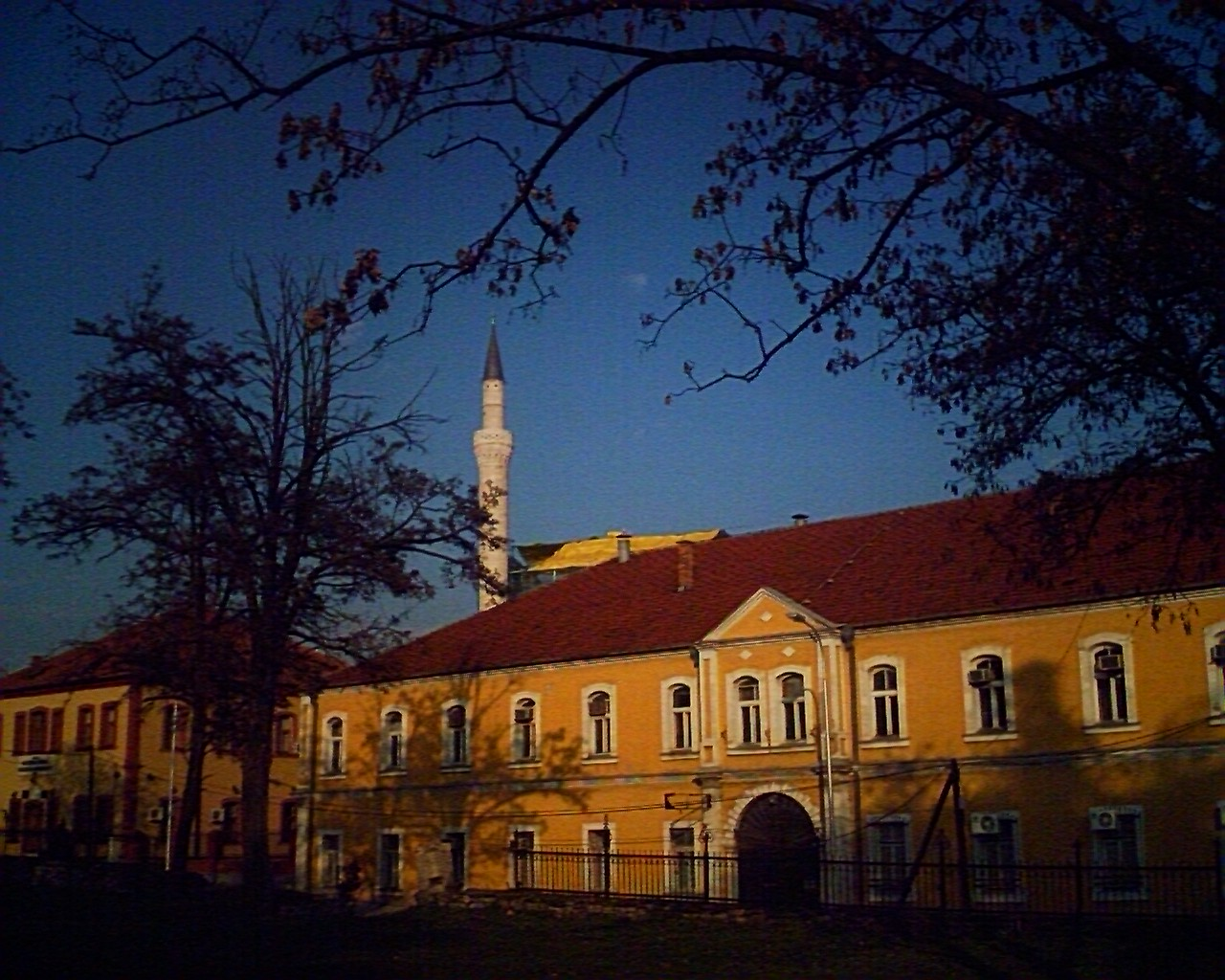 Kale - short walk 01